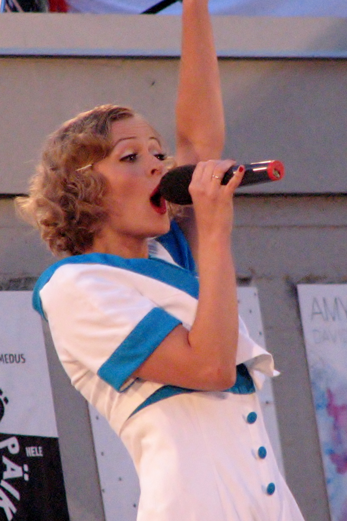 Sandra Uusberg Tallinna Linnateatri 48. hooaja avamisel